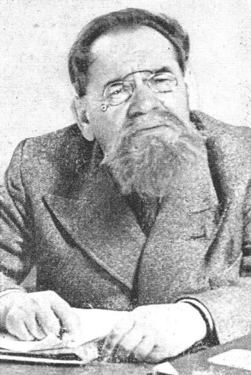 יהושע ברטונוב